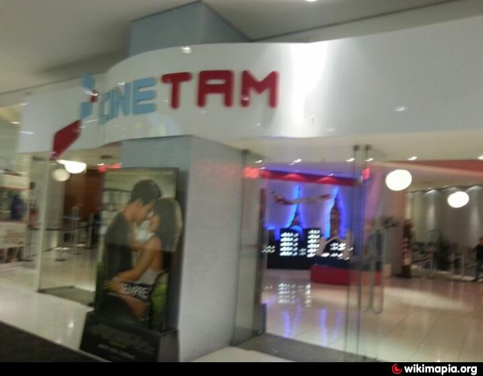 Fachada do Cine TAM Morumbi Shopping